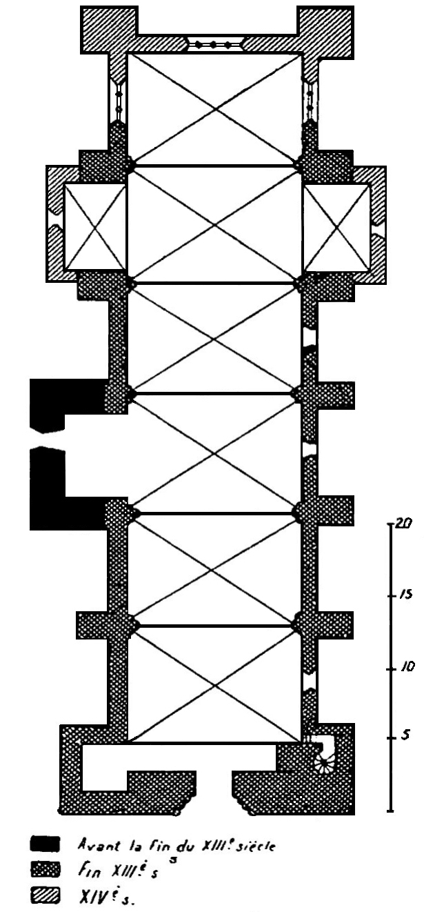 Beaumont-du-Périgord - Église Saint-Laurent-et-Saint-Front - Plan